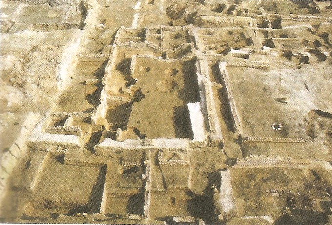 Vestiges de deux domus (emplacement du Coliseum 1994) 1